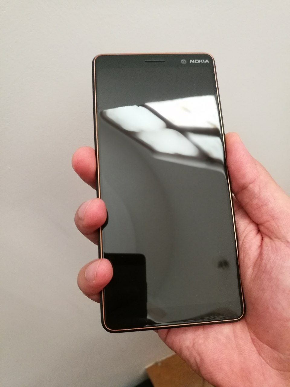 کوردی: شووشەی گۆرێلا لەسەر نۆکیا ٧ پلەس